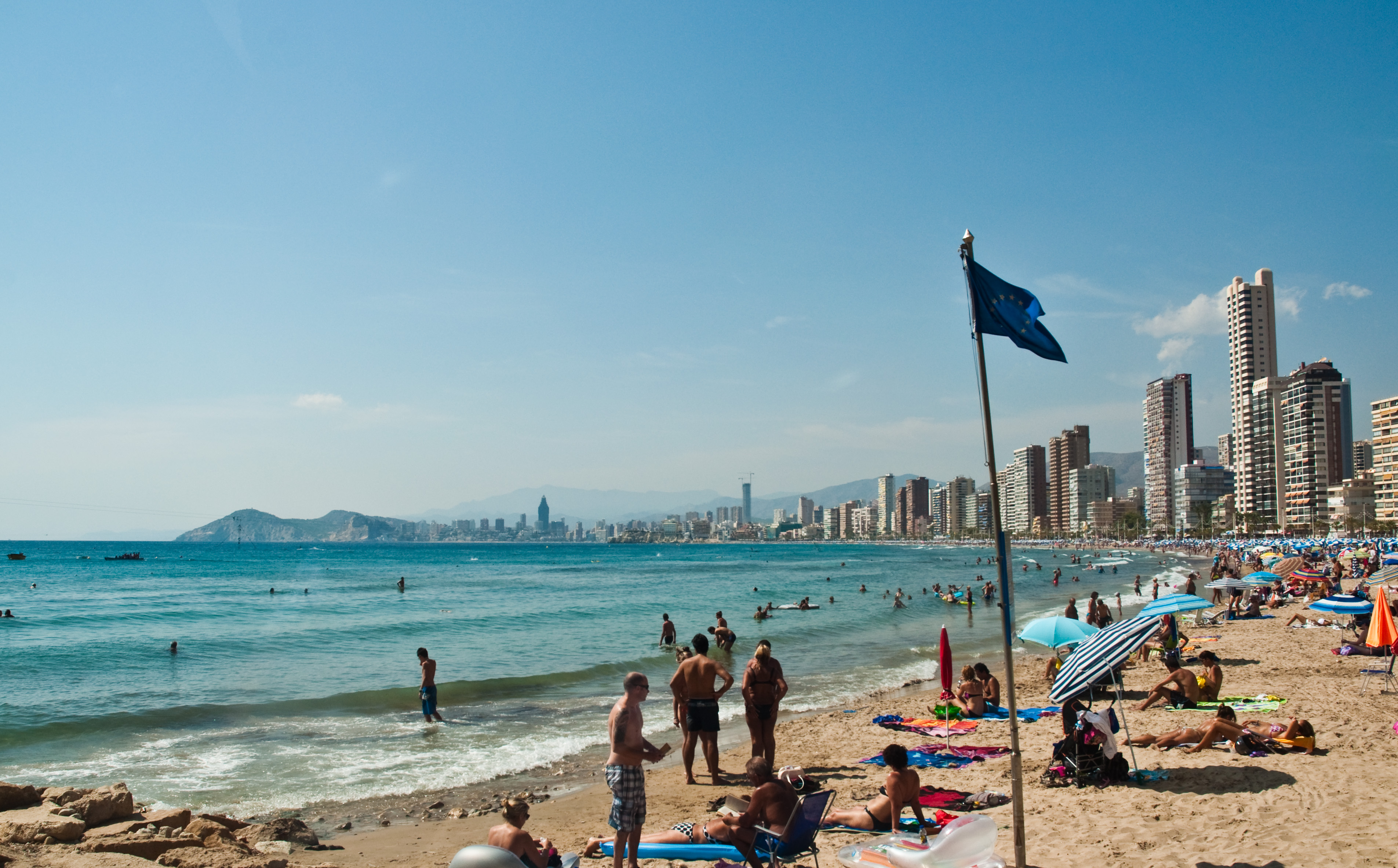 Benidorm, Costa Blanca, Spain, 18 Sept. 2011